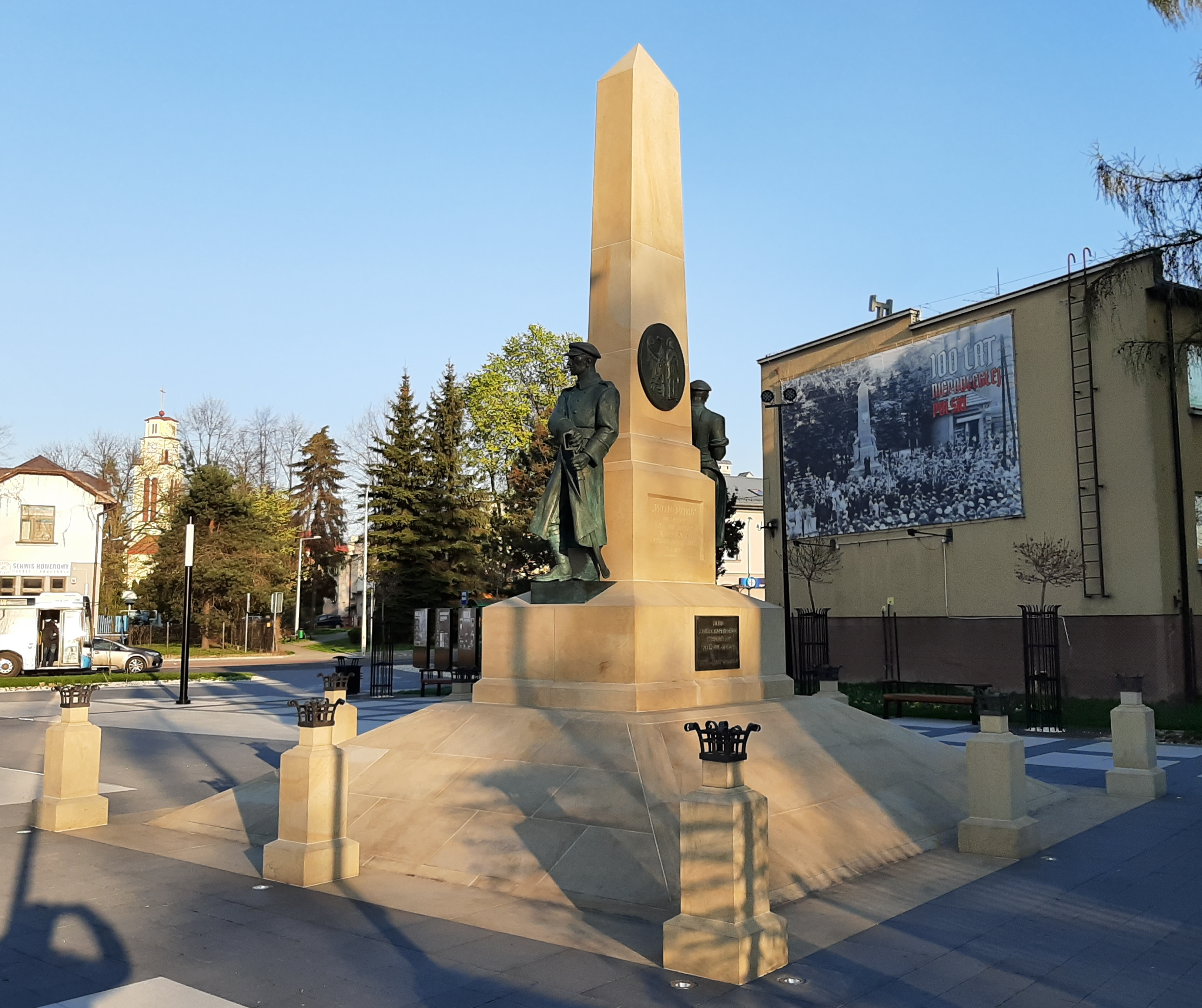 Pomnik Wolności w Czechowicach-Dziedzicach (odsłonięty 10.11.2018), stanowiący replikę pomnika zburzonego w 1939. Pierwszy pomnik powstał Pomnik Wolności w Dziedzicach został uroczyście odsłonięty 14 września 1924 roku na gruntach darowanych przez miejscowego Żyda Dawida Schneebauma, zaprojektowany przez Jana Raszkę. Był to symbol wdzięczności mieszkańców na pamiątkę wymarszu Legionistów w 1914 roku oraz za przyłączenie ziemi śląskiej do Rzeczypospolitej.